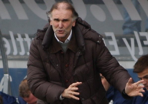 Ronald Borchers als Trainer bei Viktoria Aschaffenburg 2009